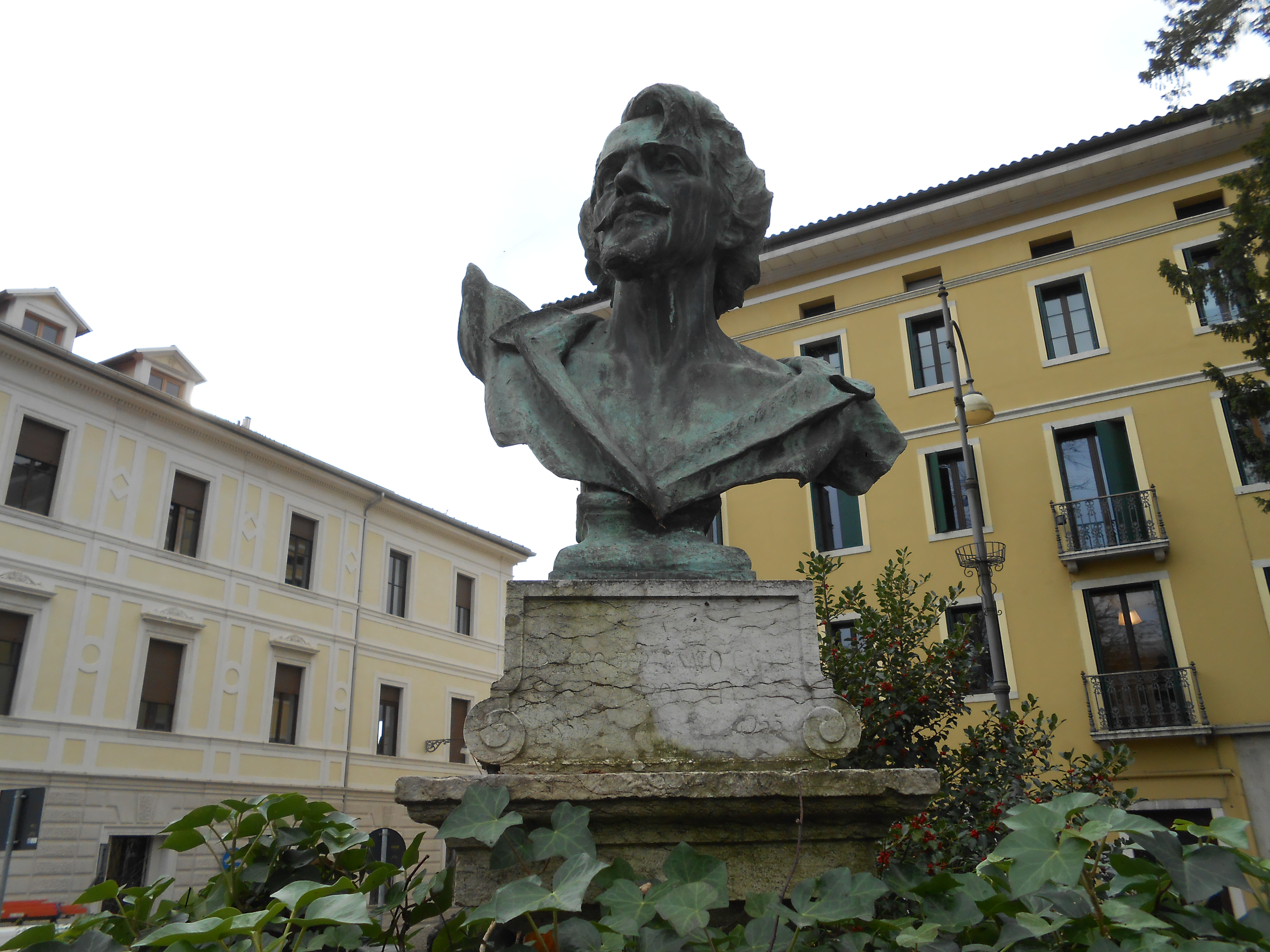 Monumento a Pietro Fortunato Calvi, Belluno